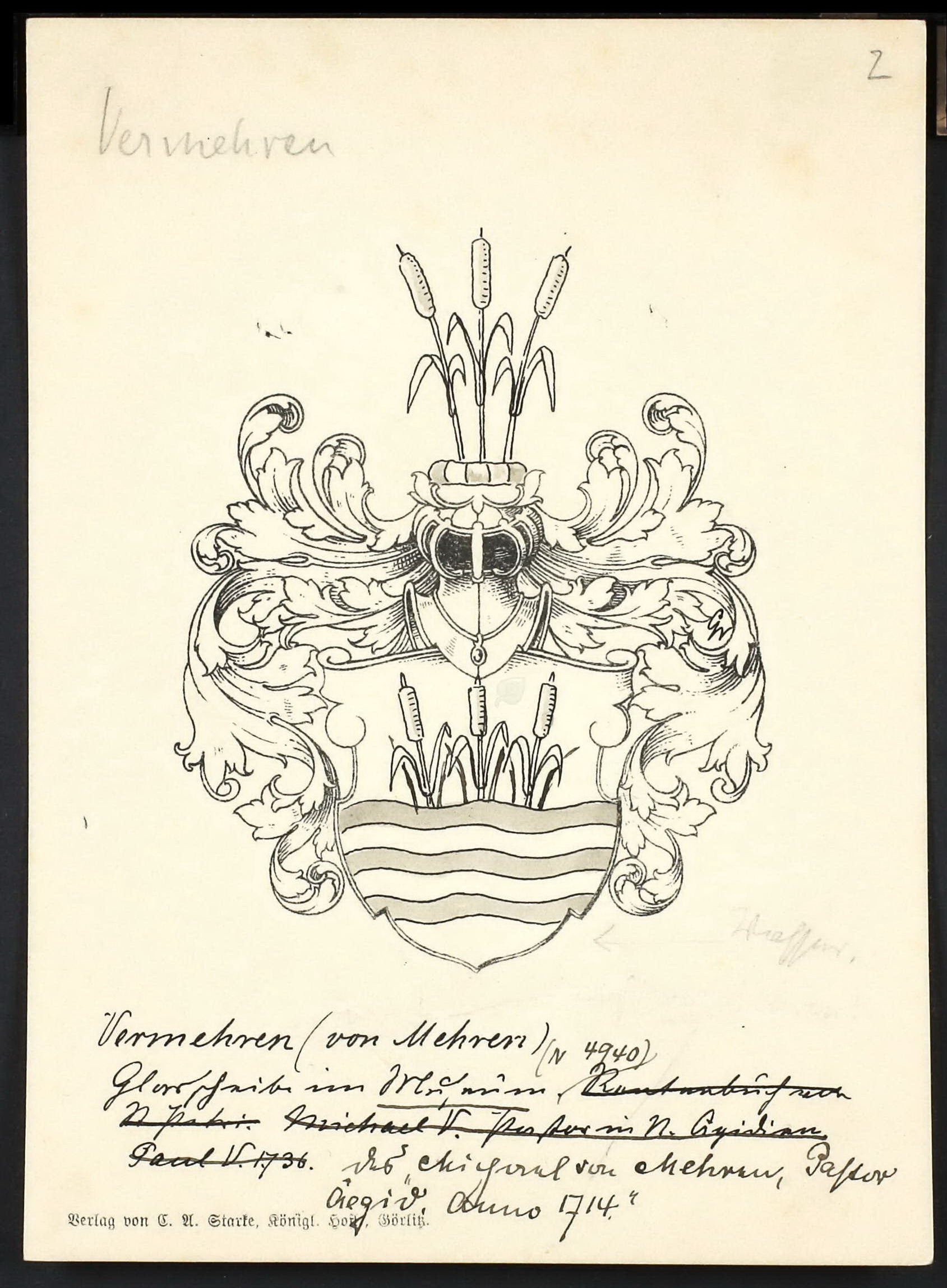 Wappen Vermehren mit Rohrkolben, aus: Archiv der Hansestadt Lübeck, comp. Wappenkarten ca. 1300-1850. Lübeck: Archiv der Hansestadt Lübeck. HS 1051.